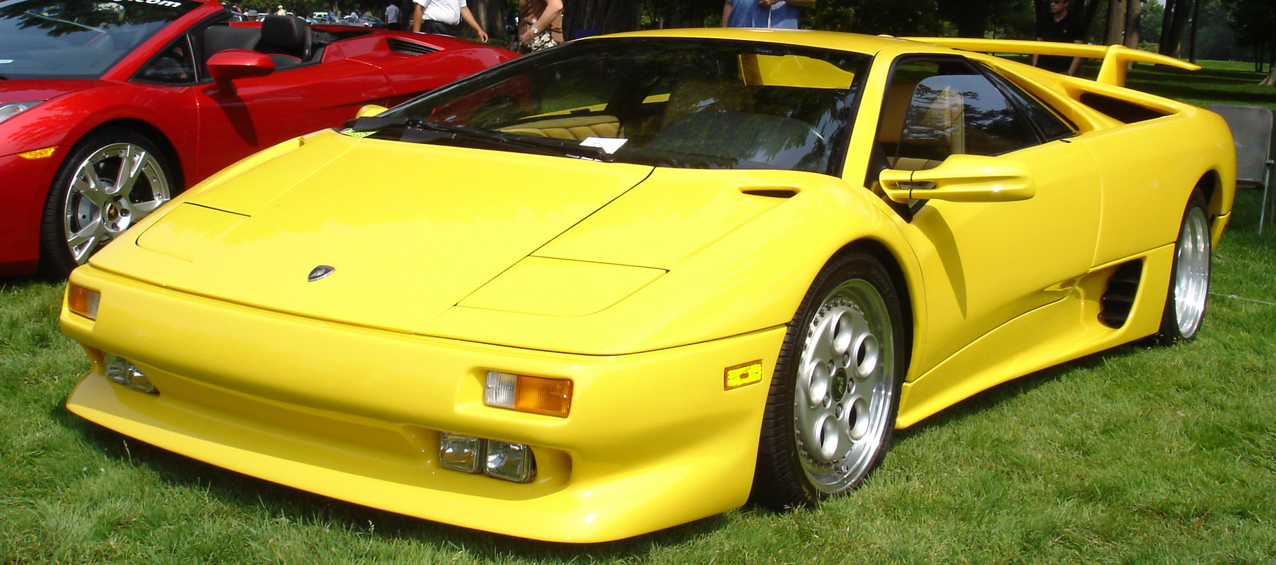 1991 Lamborghini Diablo